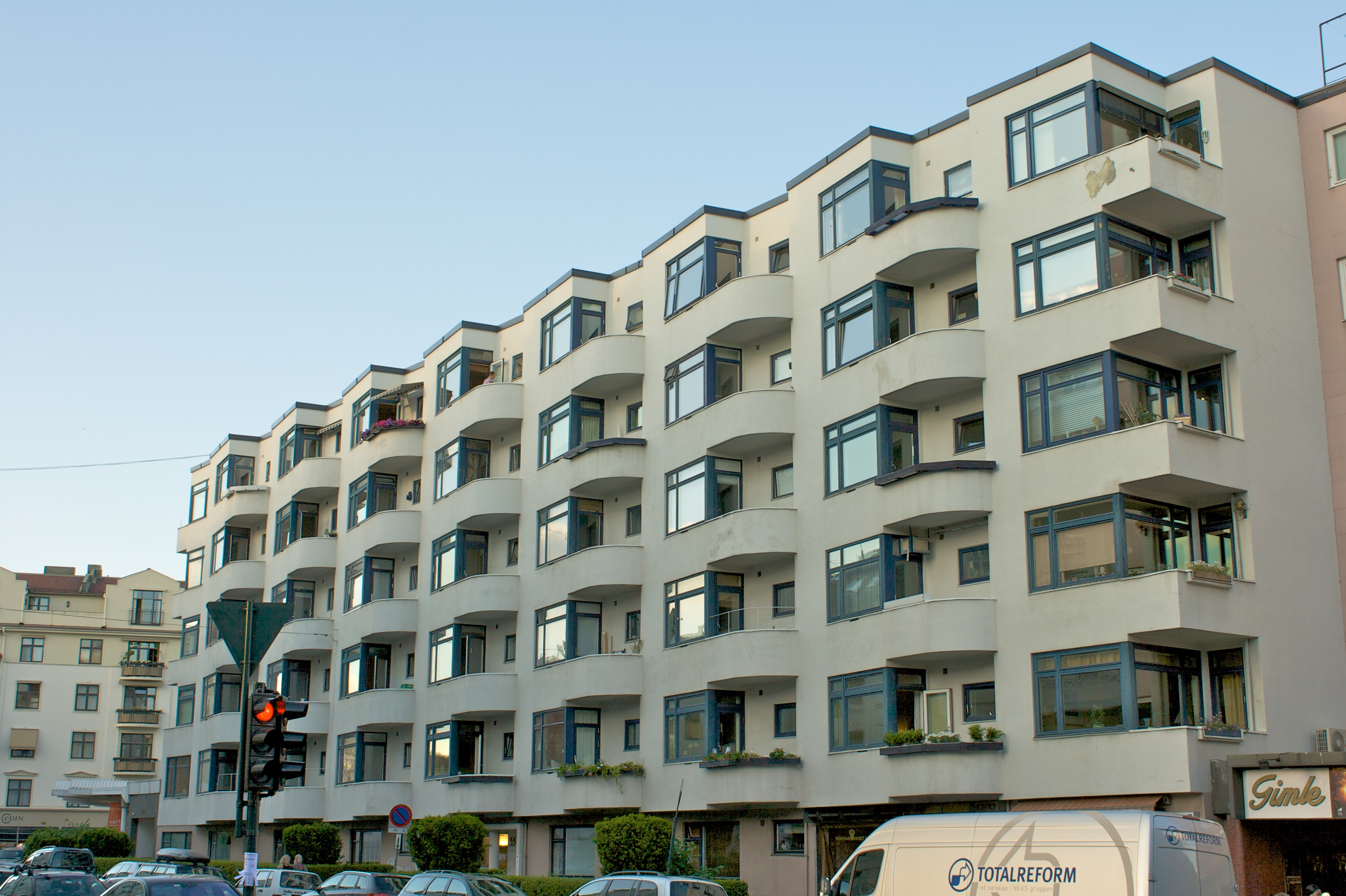 Frederik Stangs gate 35 på Frogner i Oslo.